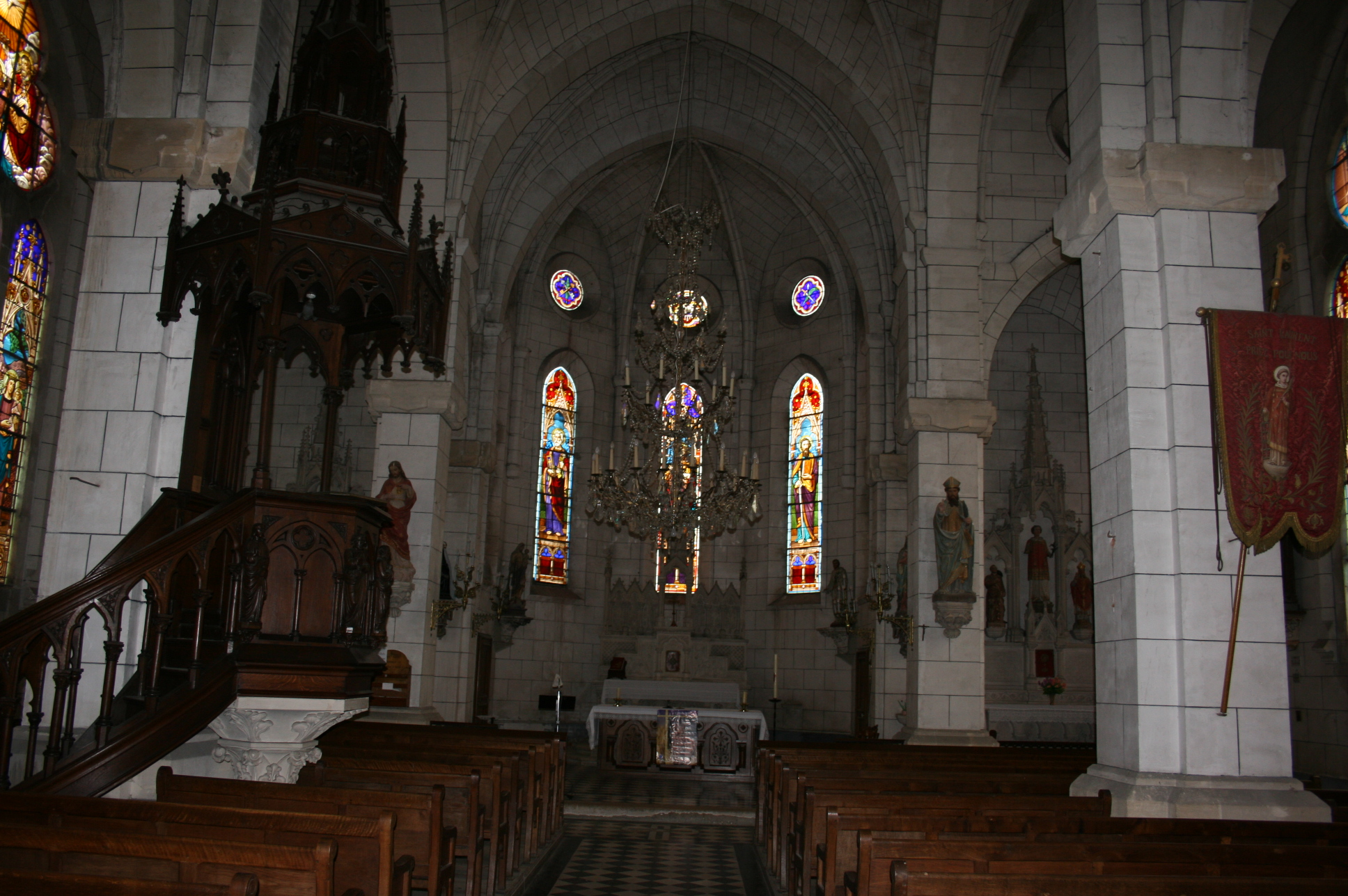 Intérieur de l'église Saint-Laurent d'Estrées